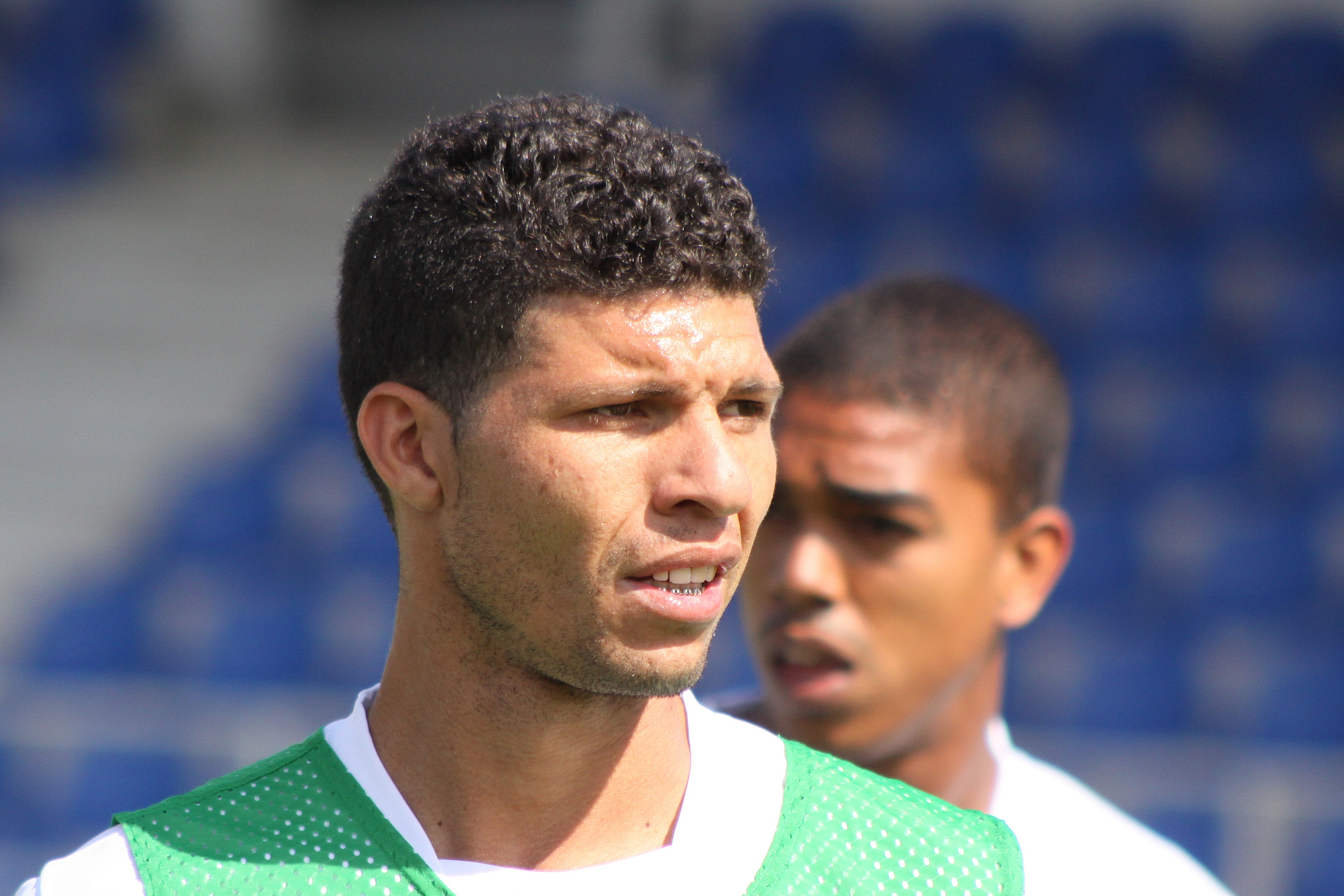 Claudiano Bezerra da Silva (Kaká) – Hertha BSC Berlin (2)